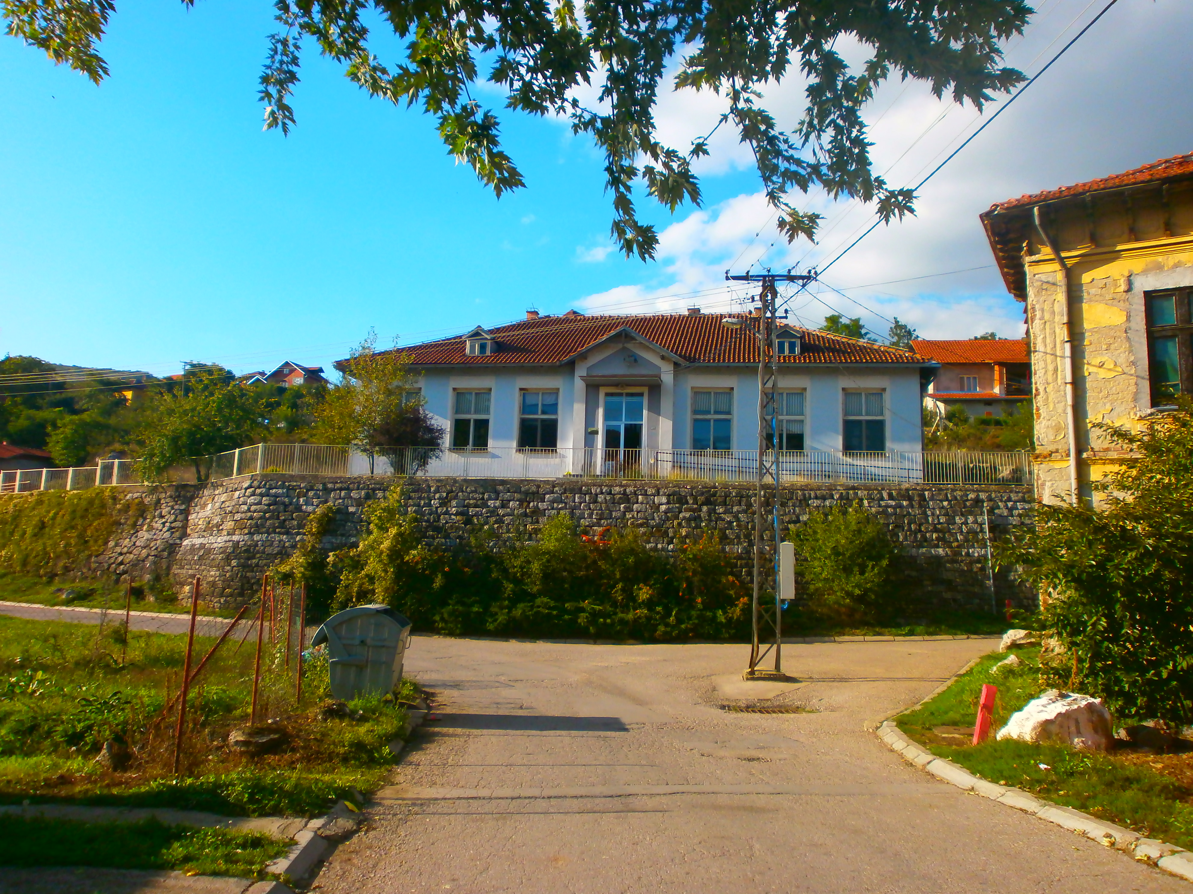 Srpski (latinica): Dimitrovgrad